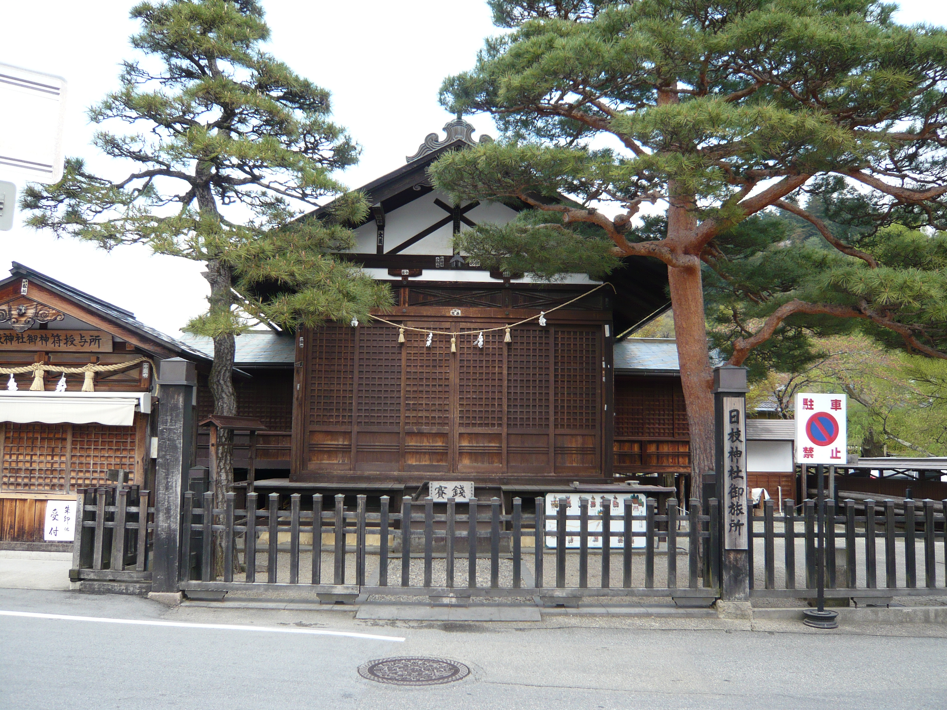 the Otabisho of Hie-jinja, Takayama, Gifu, Japan 日枝神社 (高山市)（岐阜県高山市）御旅所